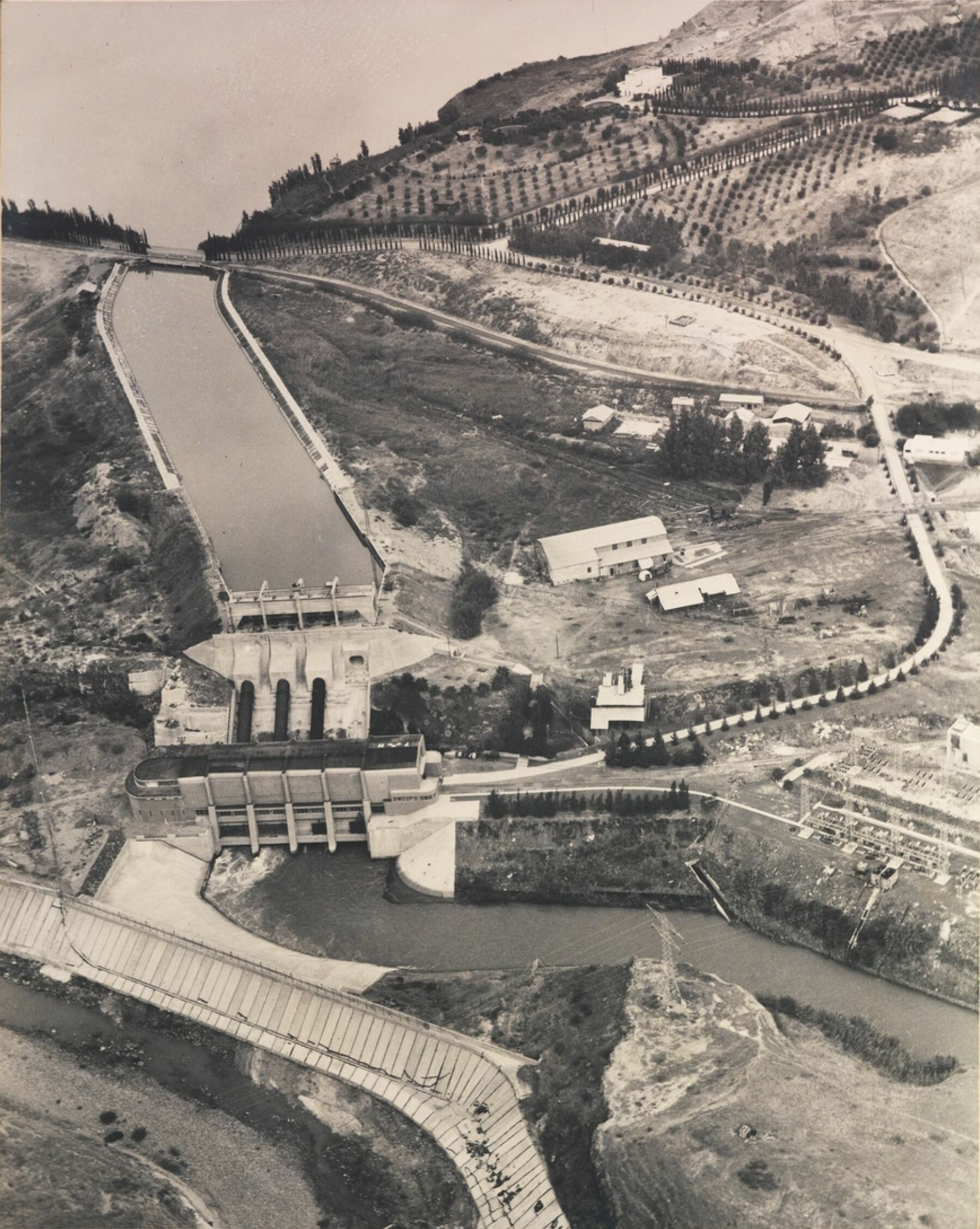 תצלומי אוויר תחנת הכוח בנהריים